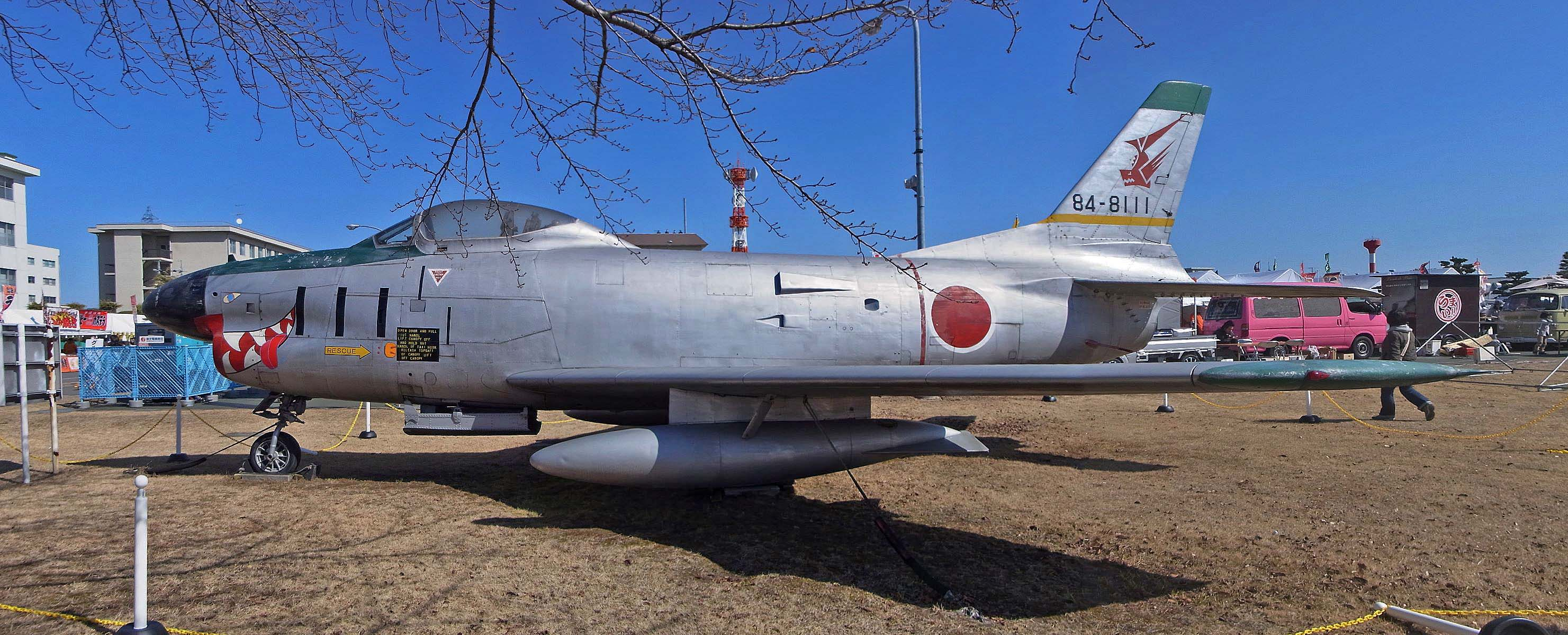 F-86D JASDF / 航空自衛隊